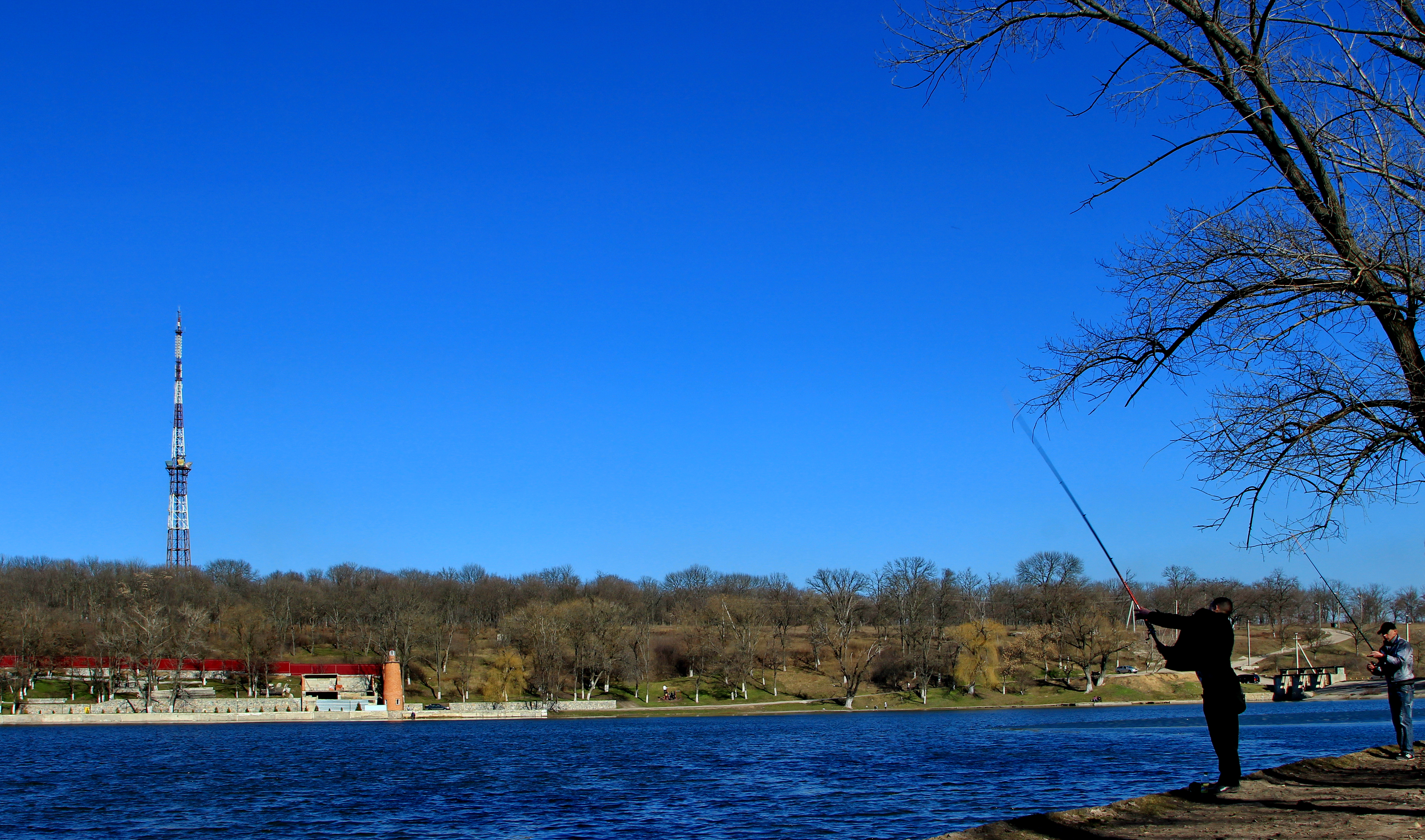 парк Перемоги (Міський сад), річка Сугоклея, дамба